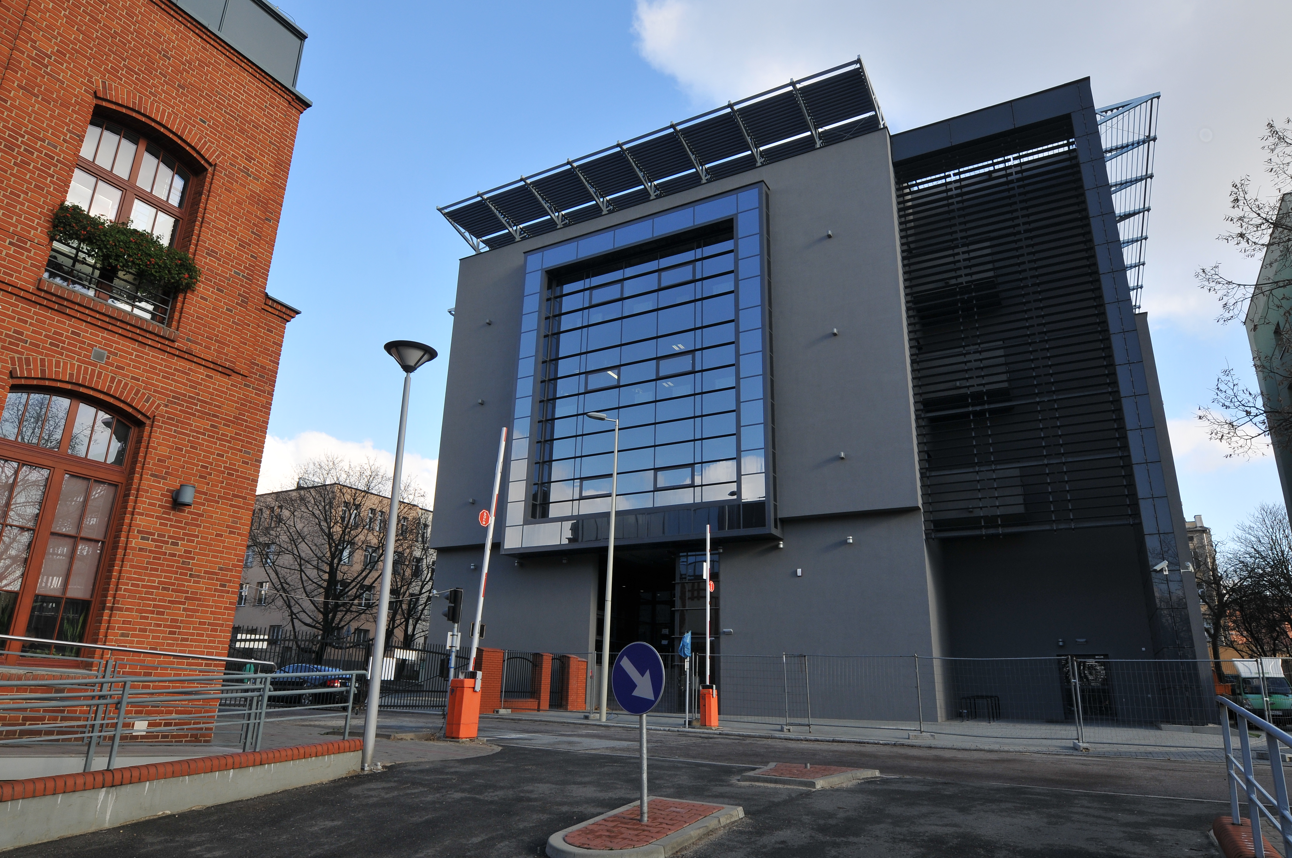 LabFactor - Baza laboratoryjno - dydaktyczna Wydziału Inżynierii Procesowej i Ochrony Środowiska PŁ ul. Stefanowskiego 2, 90-924 Łódź bud. A1